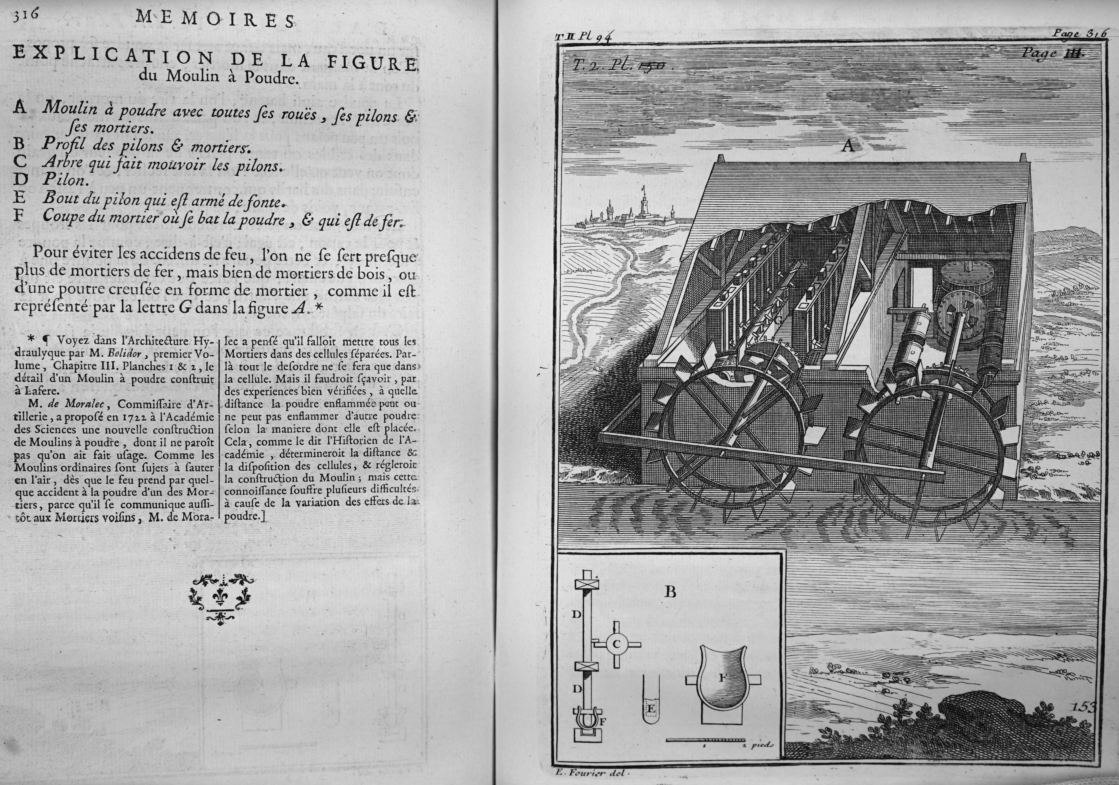 Mémoires d'artillerie, recueillis par M. Surirey de Saint Remy, tome II, exemplaire de la B.M. de Reims, troisième édition.